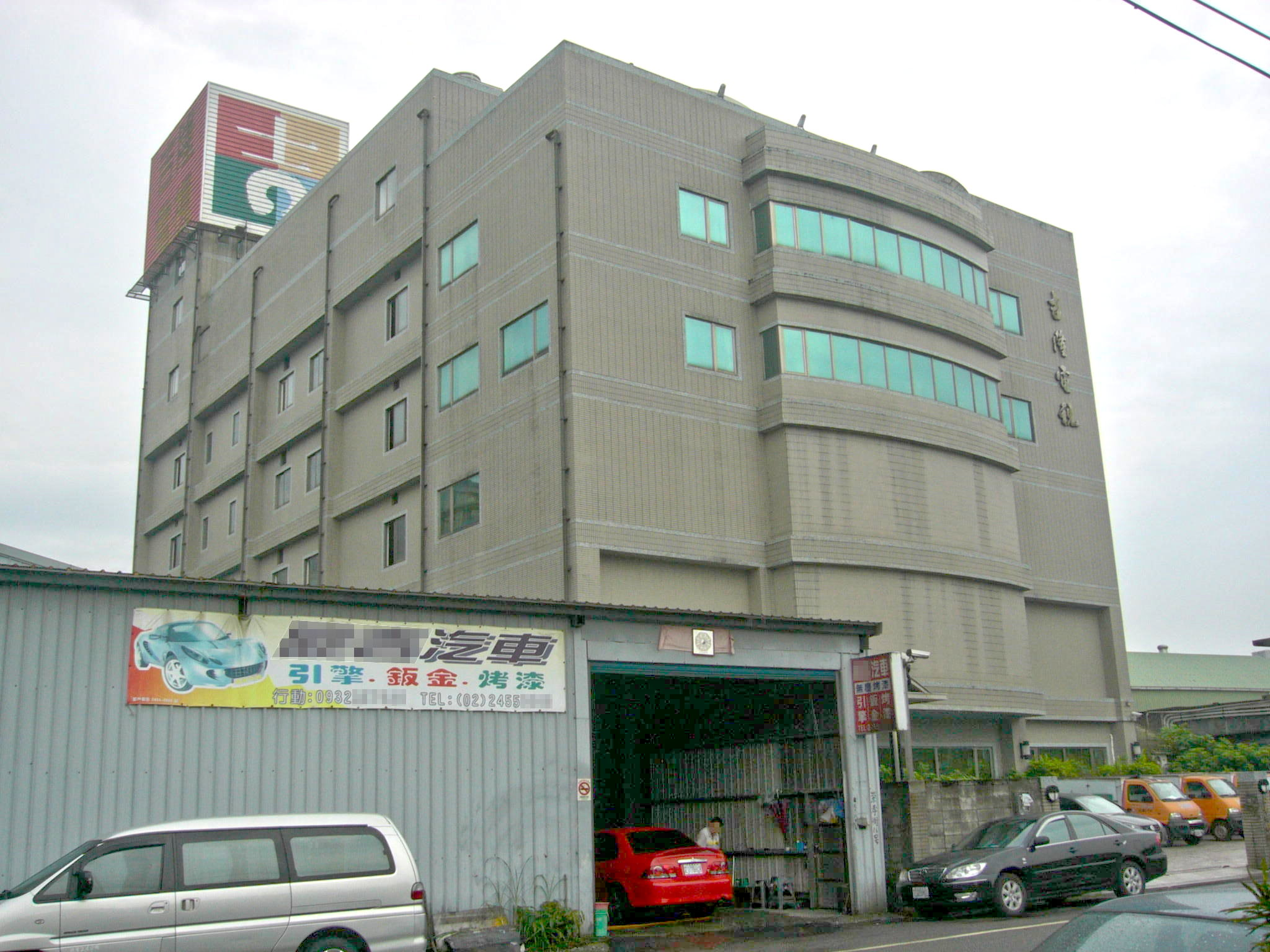 吉隆有線電視第二代總部兼第一代獨棟總部，位於基隆市七堵區崇孝街6號。拍攝時頂端彩繪吉隆有線電視商標。